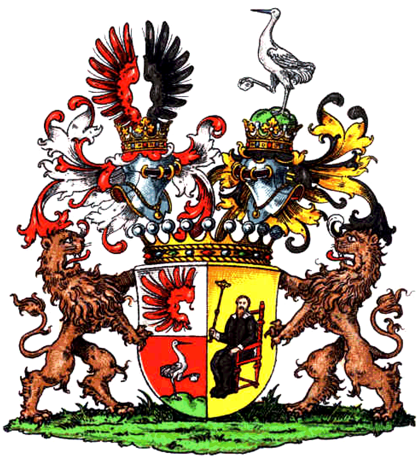 Wappen der Freiherren von Richthofen